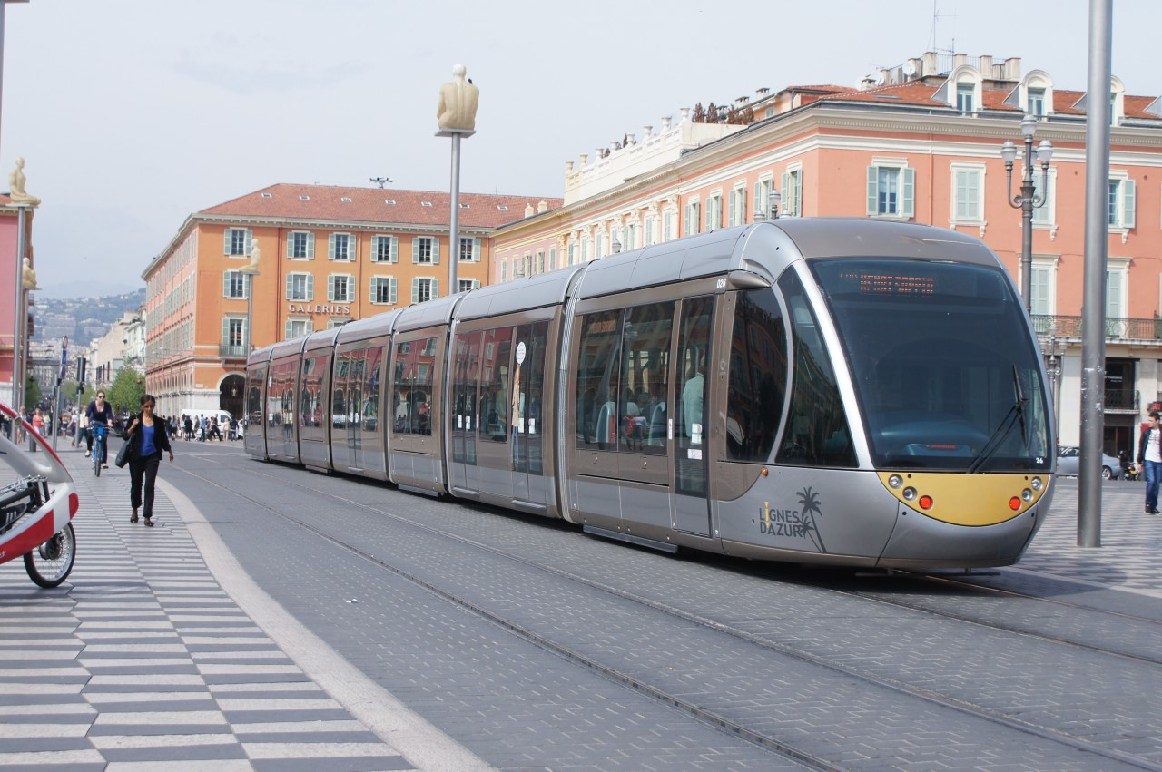 Citadis 402 Nummer 26 auf dem Abschnitt ohne Fahrleitung über die Place Masséna in Nizza.